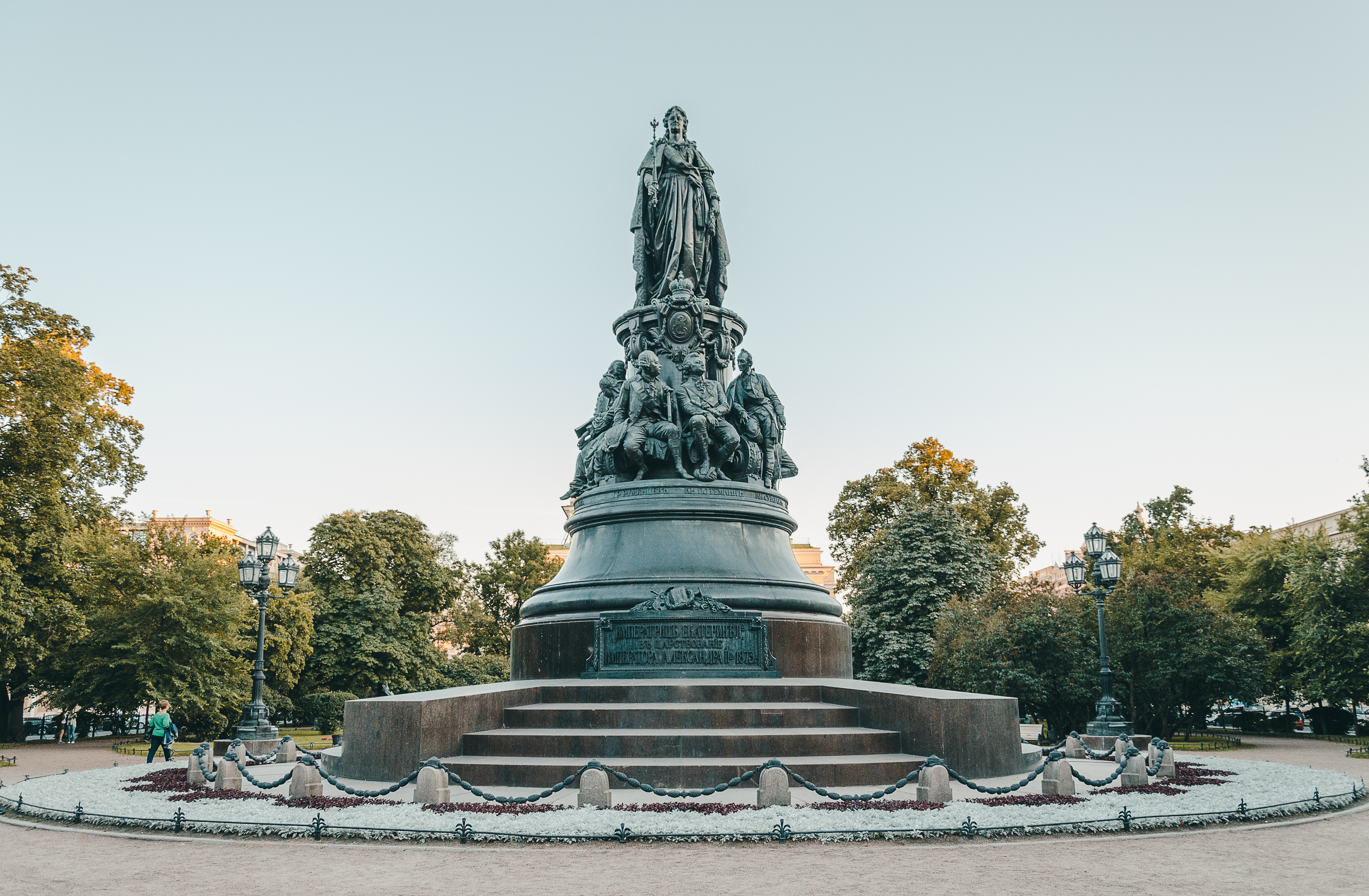 Памятник императрице Екатерине II: Площадь Островского, Центральный район, Санкт-Петербург